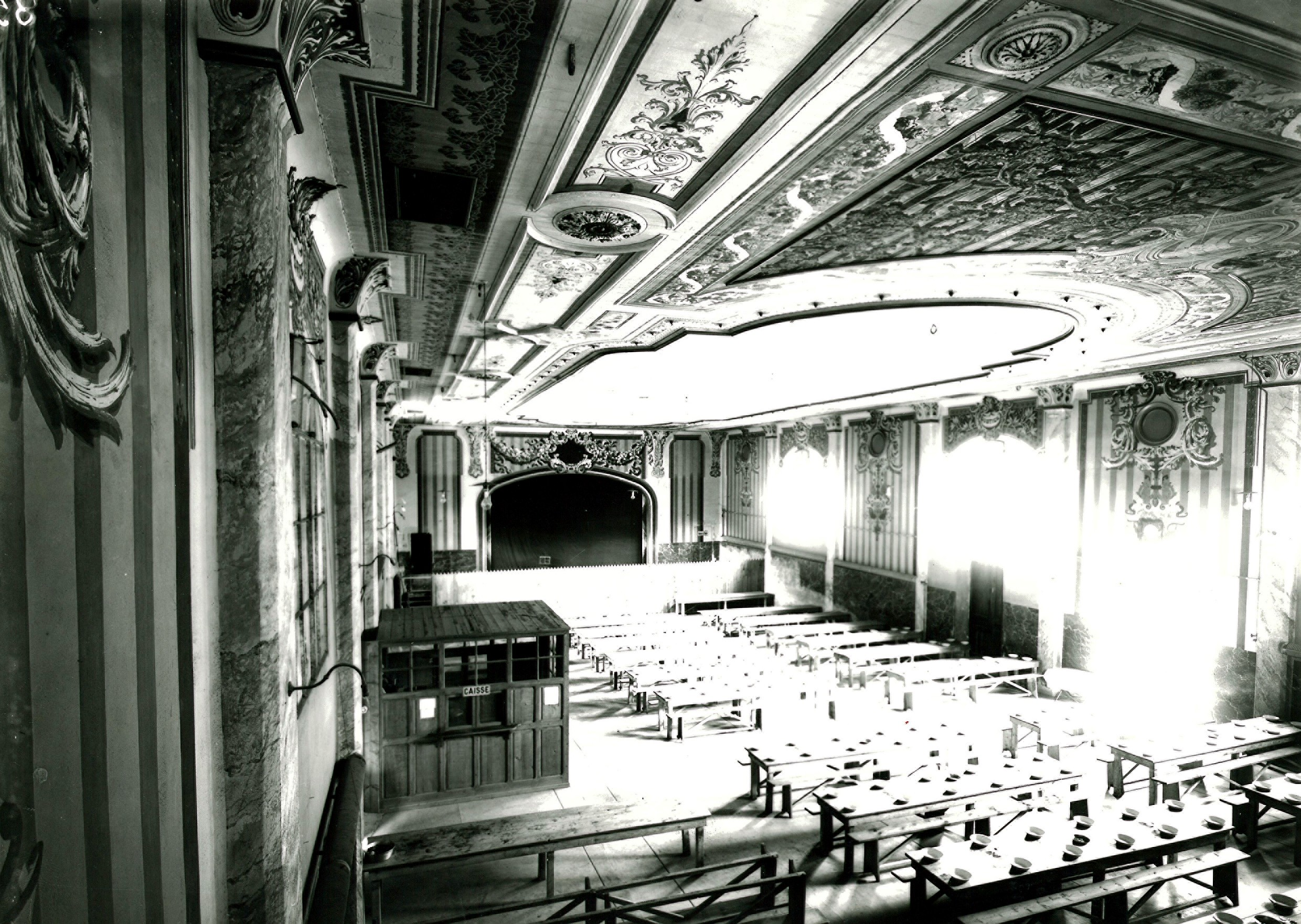 Théatre du Phalanstère en 1920